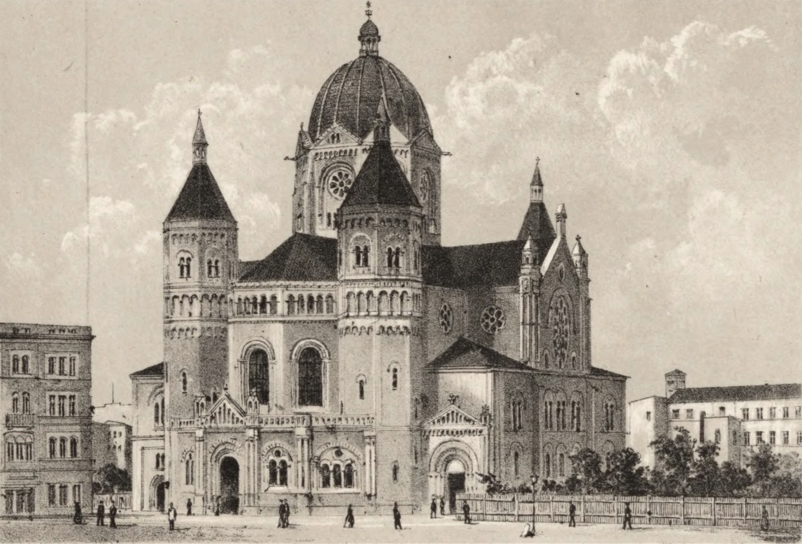 Die Neue Synagoge in Breslau im 19. Jahrhundert. Zeichnung und Lithographie von Robert Geissler.